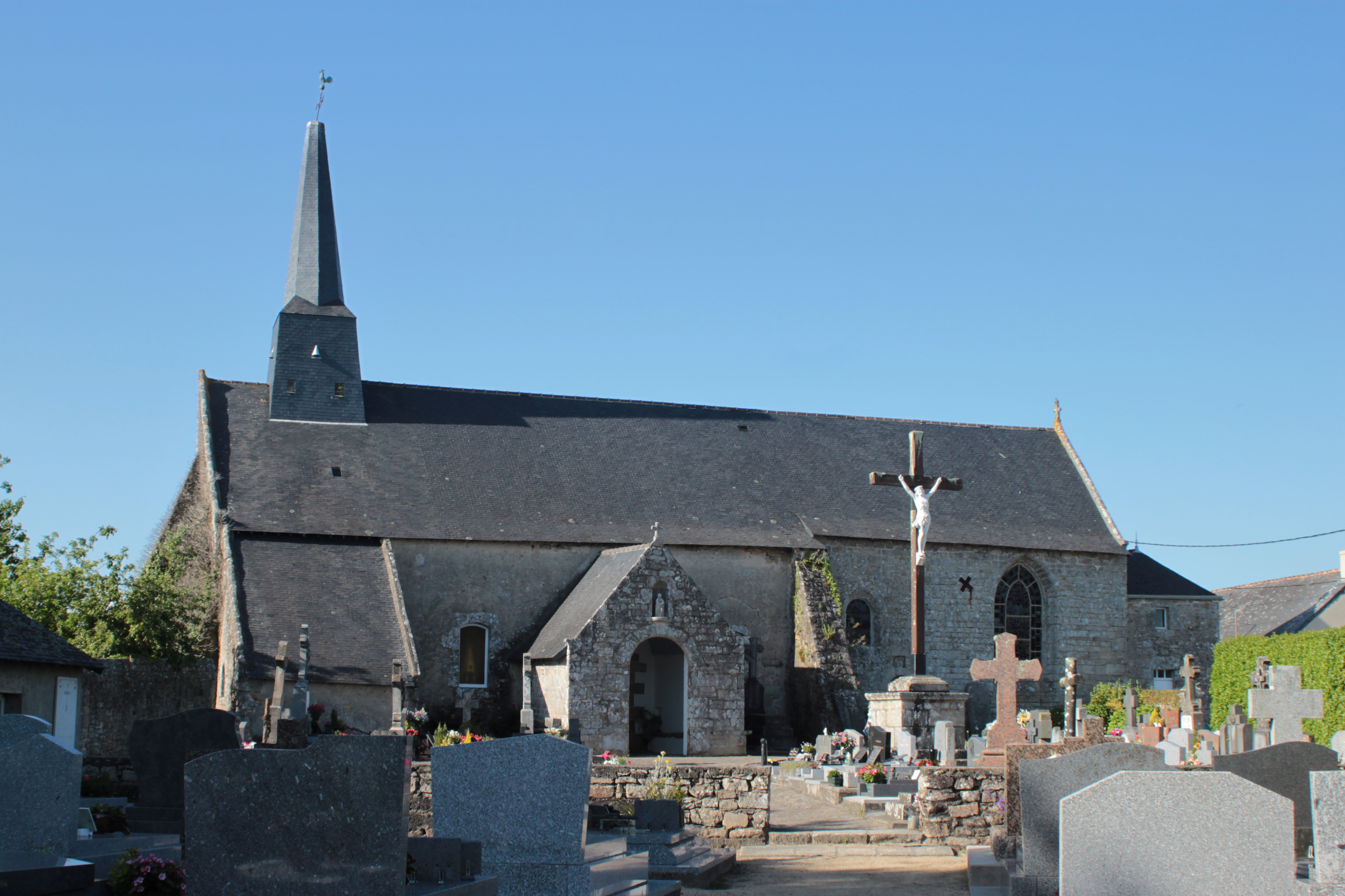 Église Saint-Goal, Locoal, Fr-56-Locoal-Mendon.